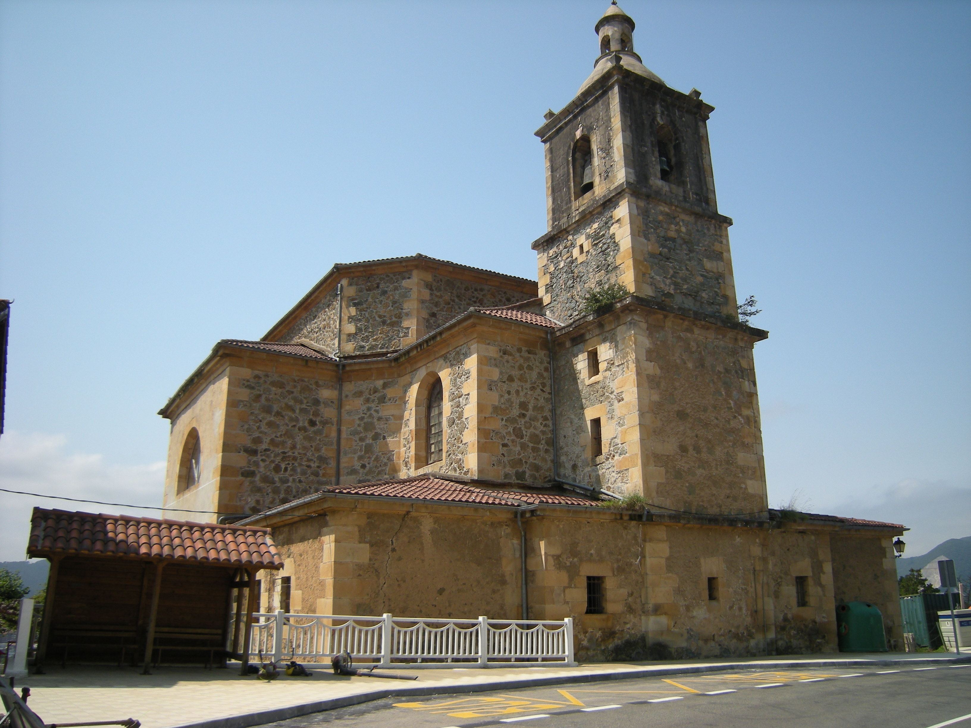 La iglesia de la Ascensión del Señor de Ajangiz, situada en el barrio de Mendieta, es una iglesia de planta basilical construida en estilo neoclásico.